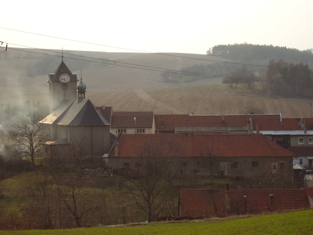 Pohled na kostel Všech svatých od východu.